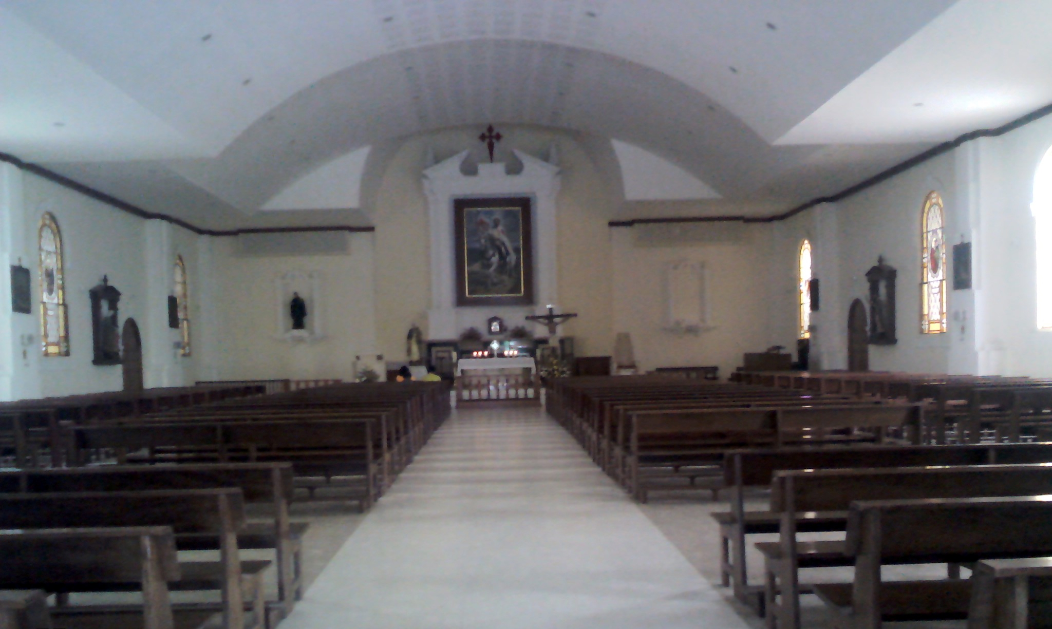 Catedral de Moyobamba